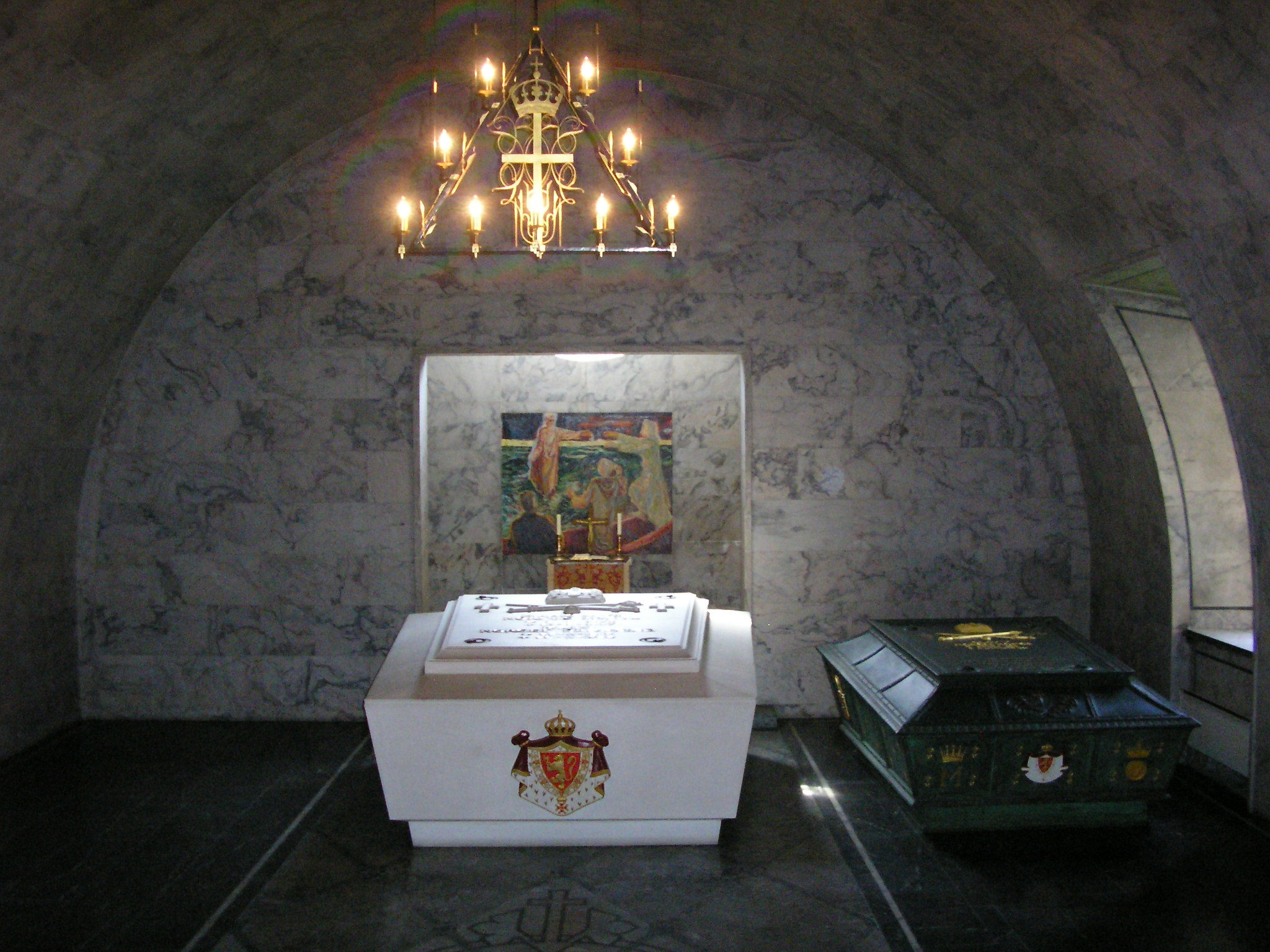 Det kongelege mausoleet på Akershus. Haakon VII og Maud ligg i sarkofagen i midten. Olav V og Märtha ligg i sarkofagen til høgre.